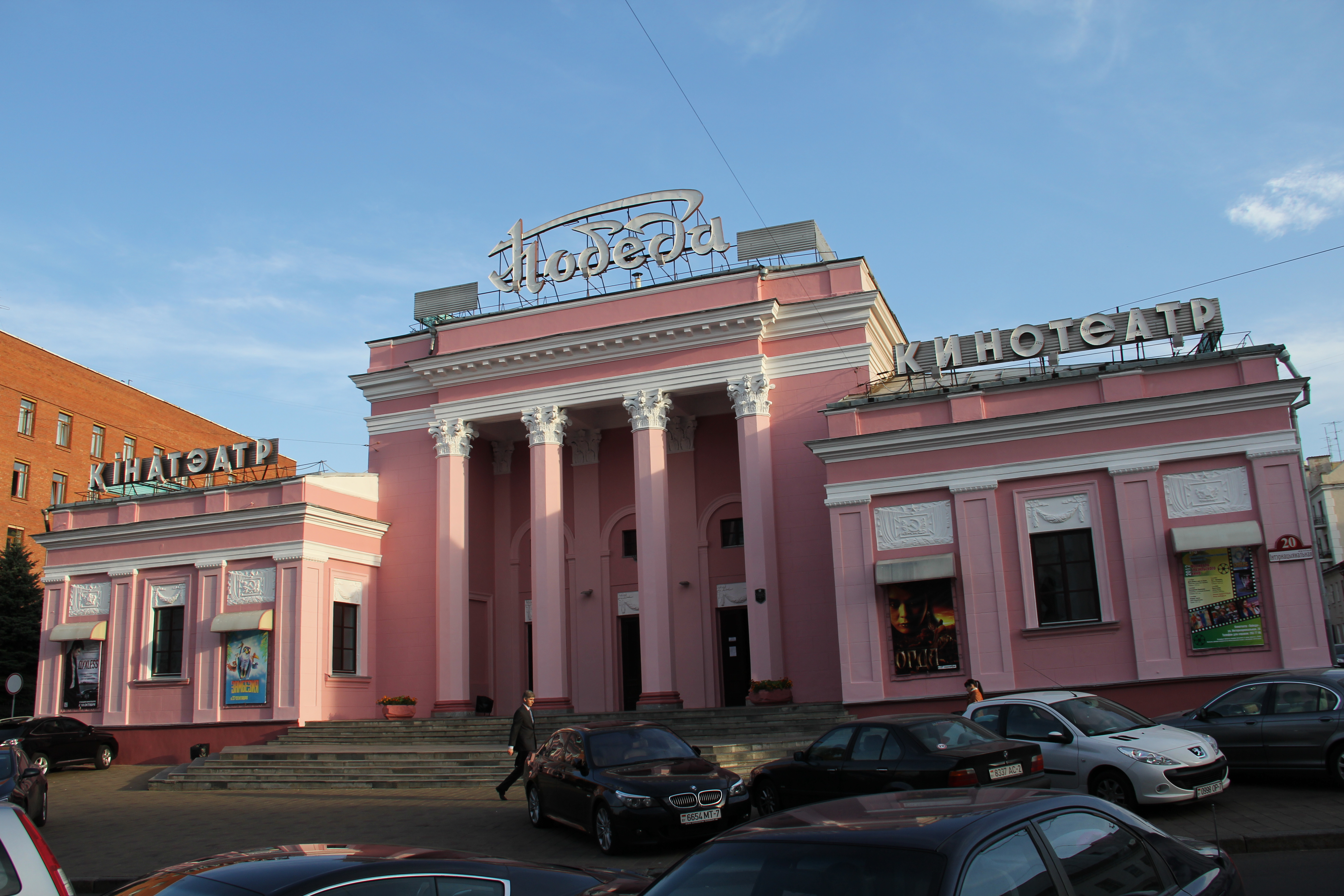 Беларуская (тарашкевіца): Будынак кінатэатра «Перамога». г. Менск This is a photo of Belarusian heritage monument. Reference number: 713Г000038 ( WLM)